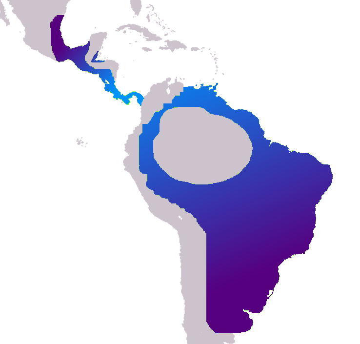 Localização geografica da Coruja Orelhuda (Rhinoptynx clamator)